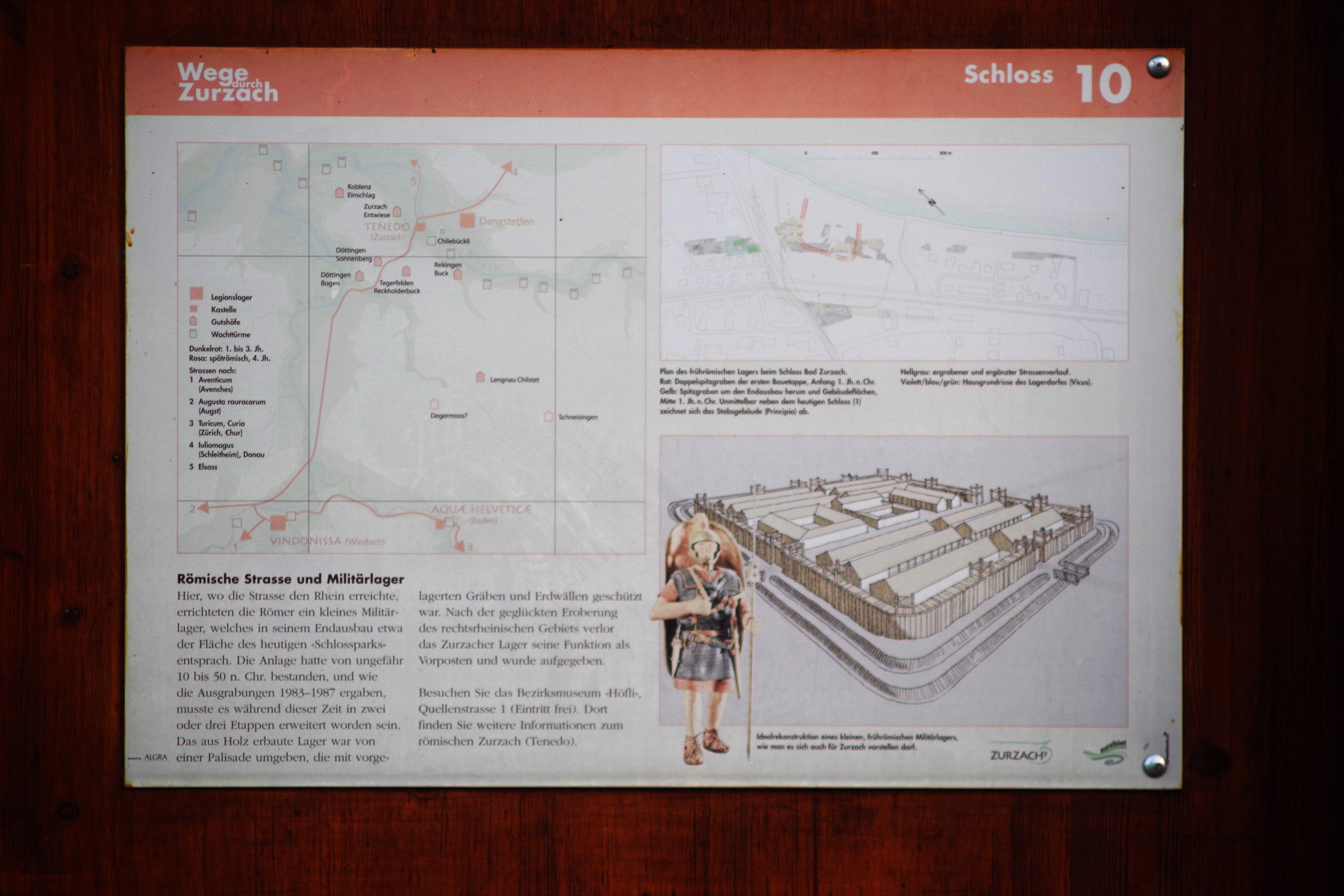 Hinweistafel zum römischen Militärlager beim Schloss Zurzach